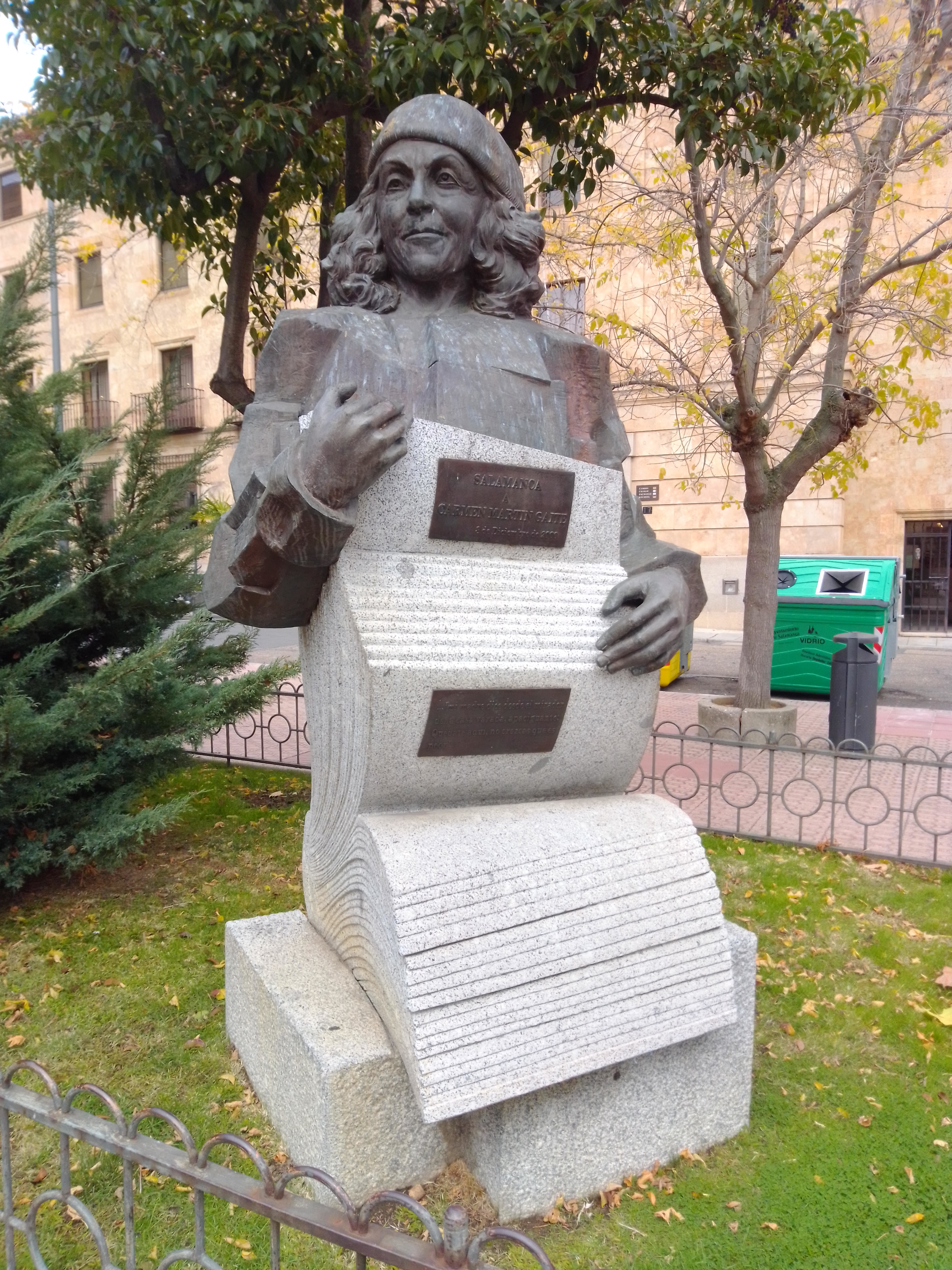 Monumento a Carmen Martín Gaite, obra en bronce y granito gris de la escultora española Narcisa Vicente Rodríguez. La escultura, de 280 cm de altura, fue inaugurada en la plaza de los Bandos de Salamanca el 8 de diciembre de 2000, meses después de la muerte de la escritora.